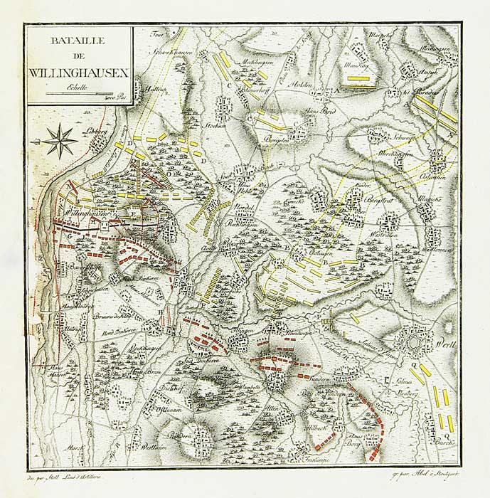 Схема сражения при Фелингхаузене